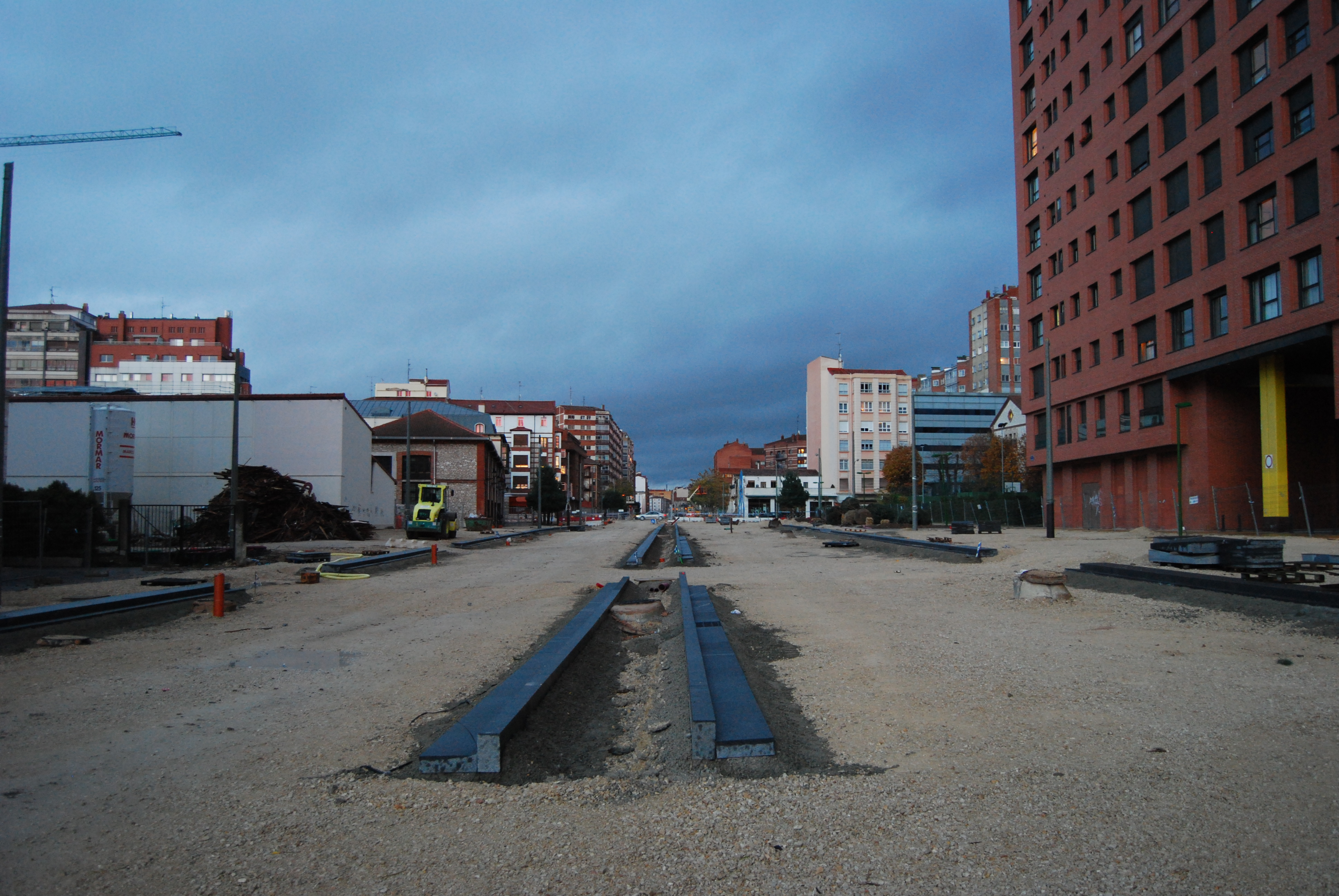 Obras de construcción del Bulevar Ferroviario de Burgos. Tramo entre El Carmen y la Calle Madrid